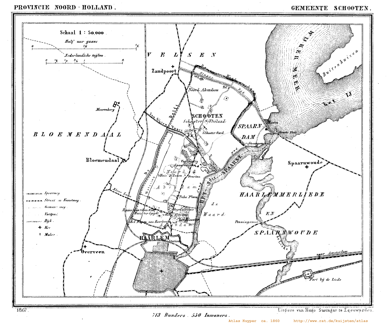 Kaart van Schoten (Nederland) uit Gemeente Atlas van Nederland, J. Kuyper 1865-1870, Uitgave Hugo Suringar Leeuwarden.